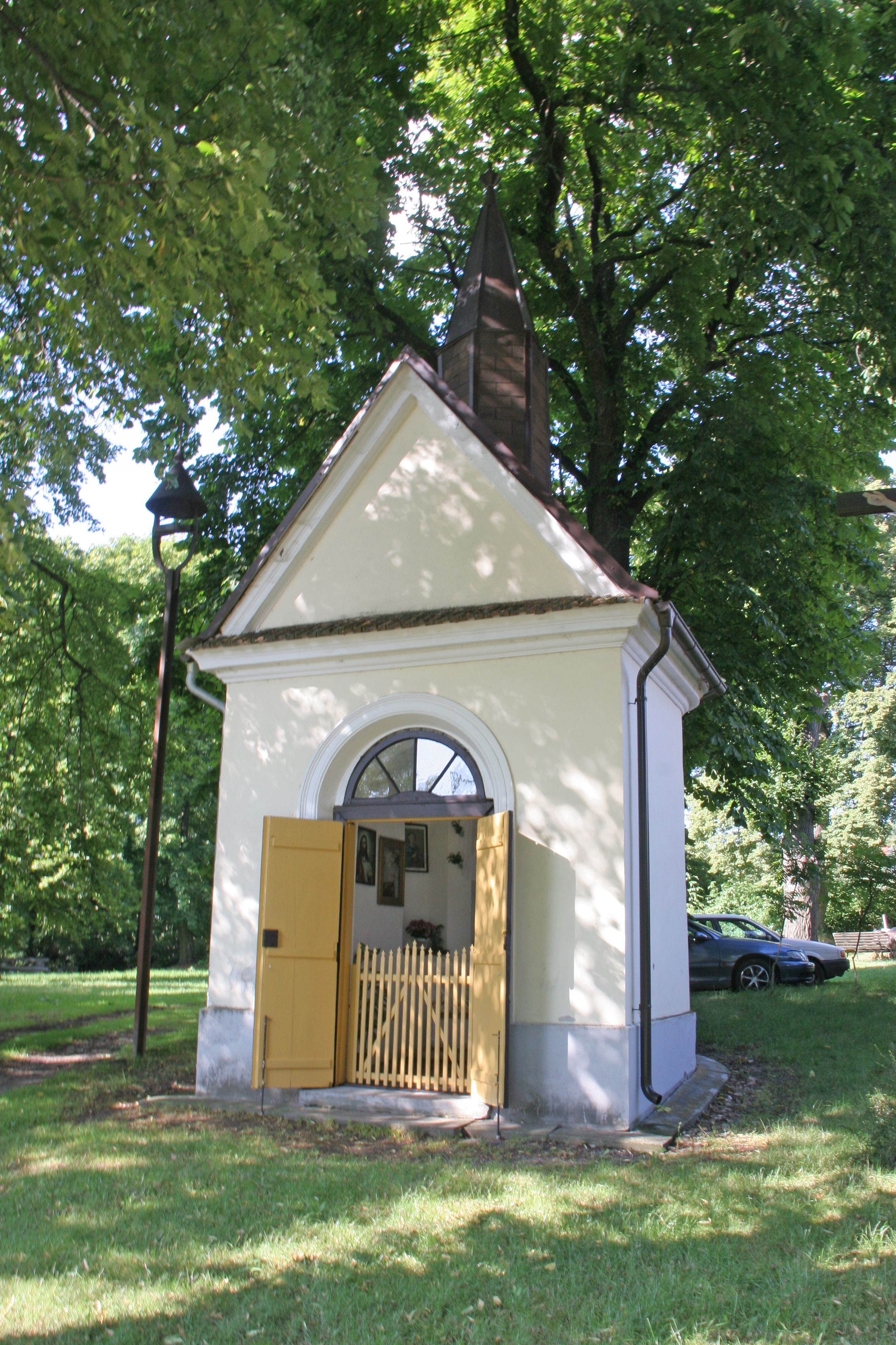 Proseč kaple